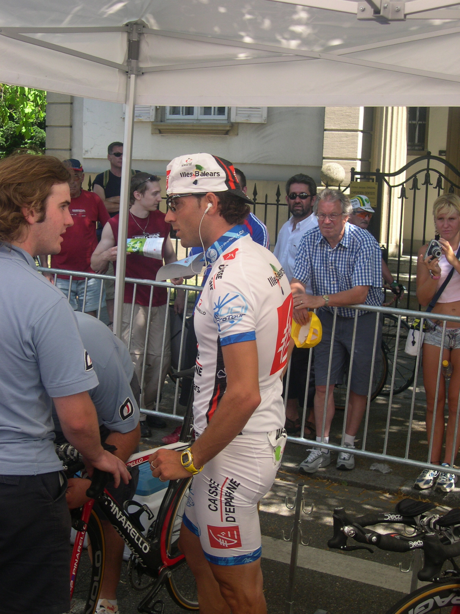 Alejandro Valverde bei der Tour de France 2006 (Prolog in Straßburg).